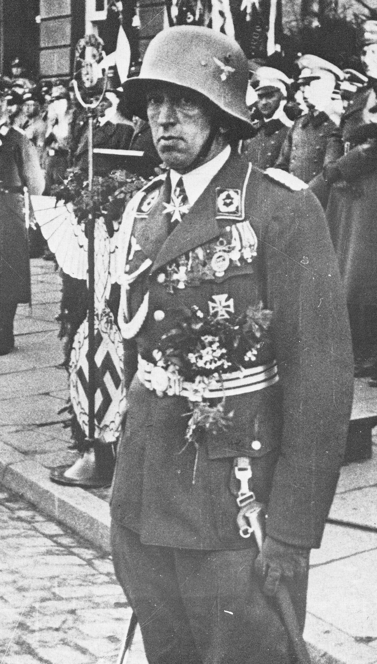 Theo Osterkamp, erster Kommandeur